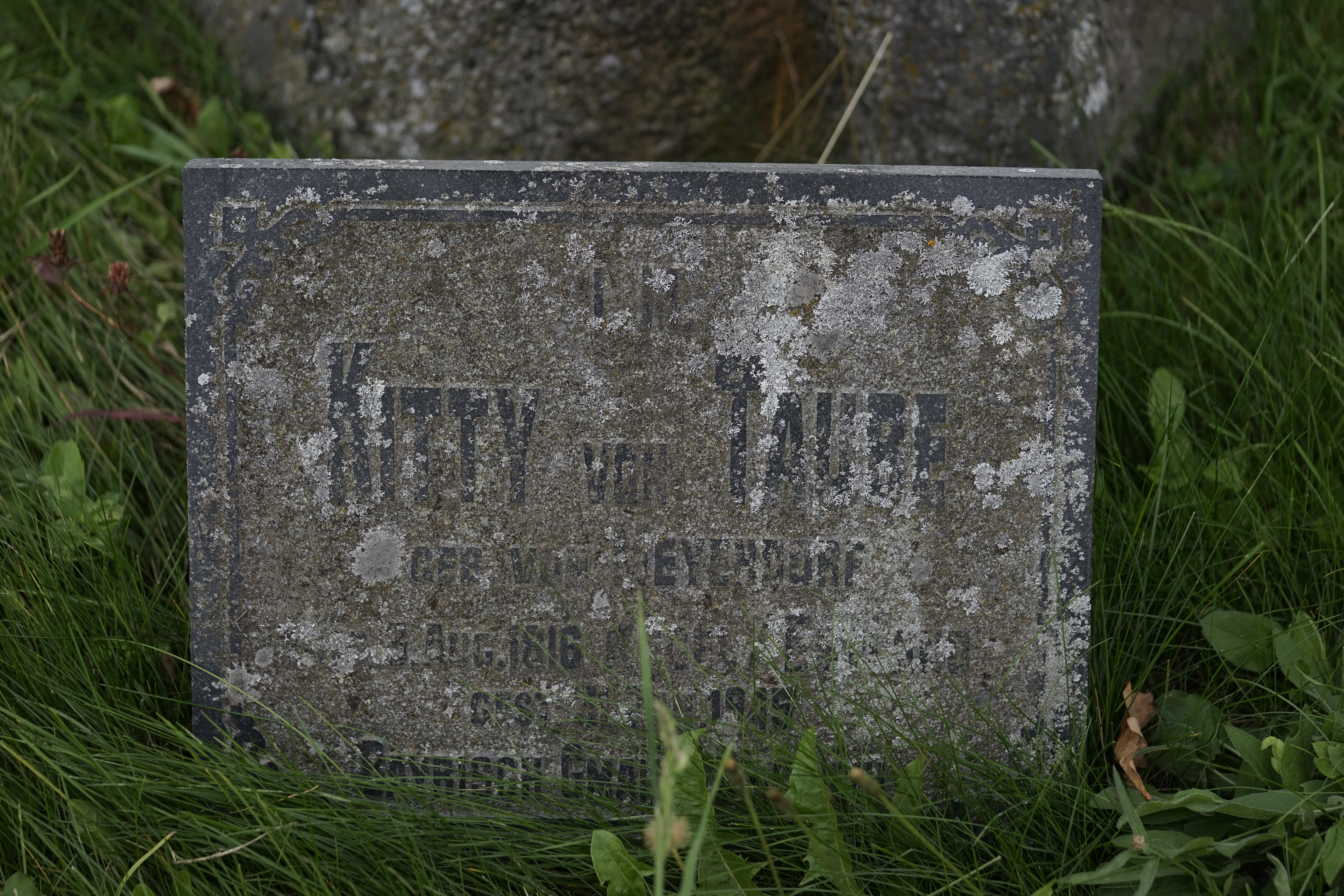 Türi Kirchfriedhof 2015, Detail: Grabstein der Kitty von Taube, 1876-1933, geb. von Meyendorff, Ehefrau des Otto von Taube